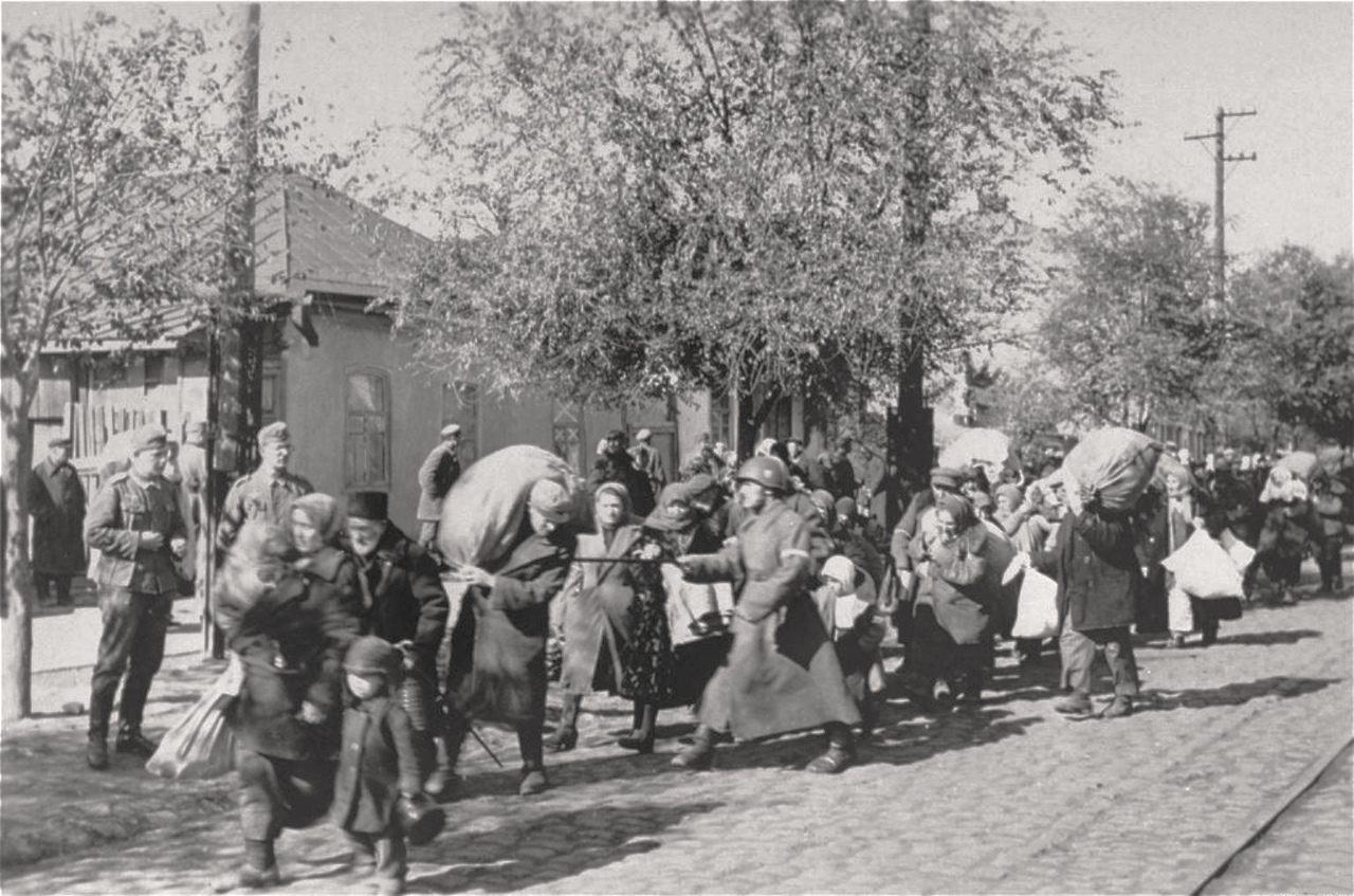 Митинг оккупантов. 1942 г. Фото, было найденно у пленного немецкого офицера. (Из фондов Криворожского историко-краеведческого музея).